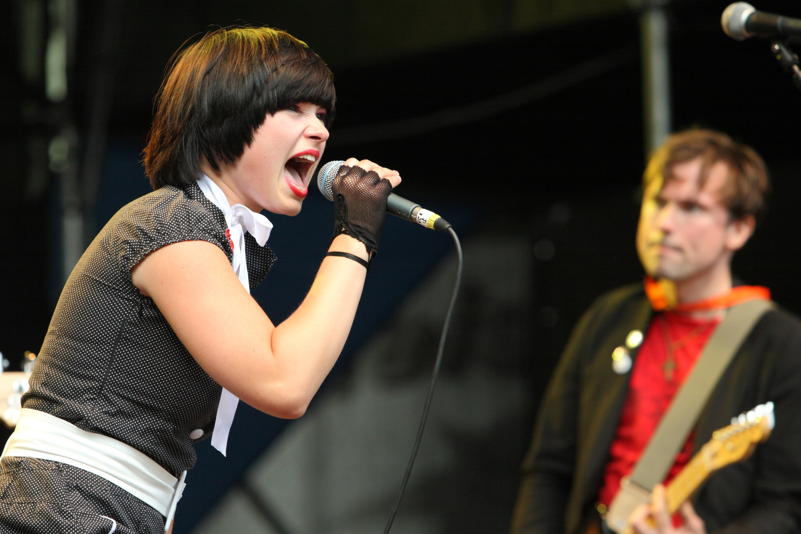 Anna Fischer von Panda bei Bochum Total 2007